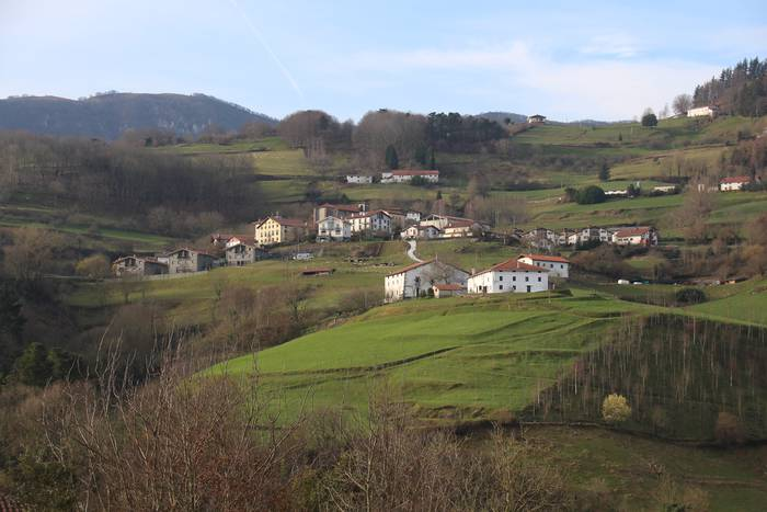 Larraul, Asteasutik ikusita